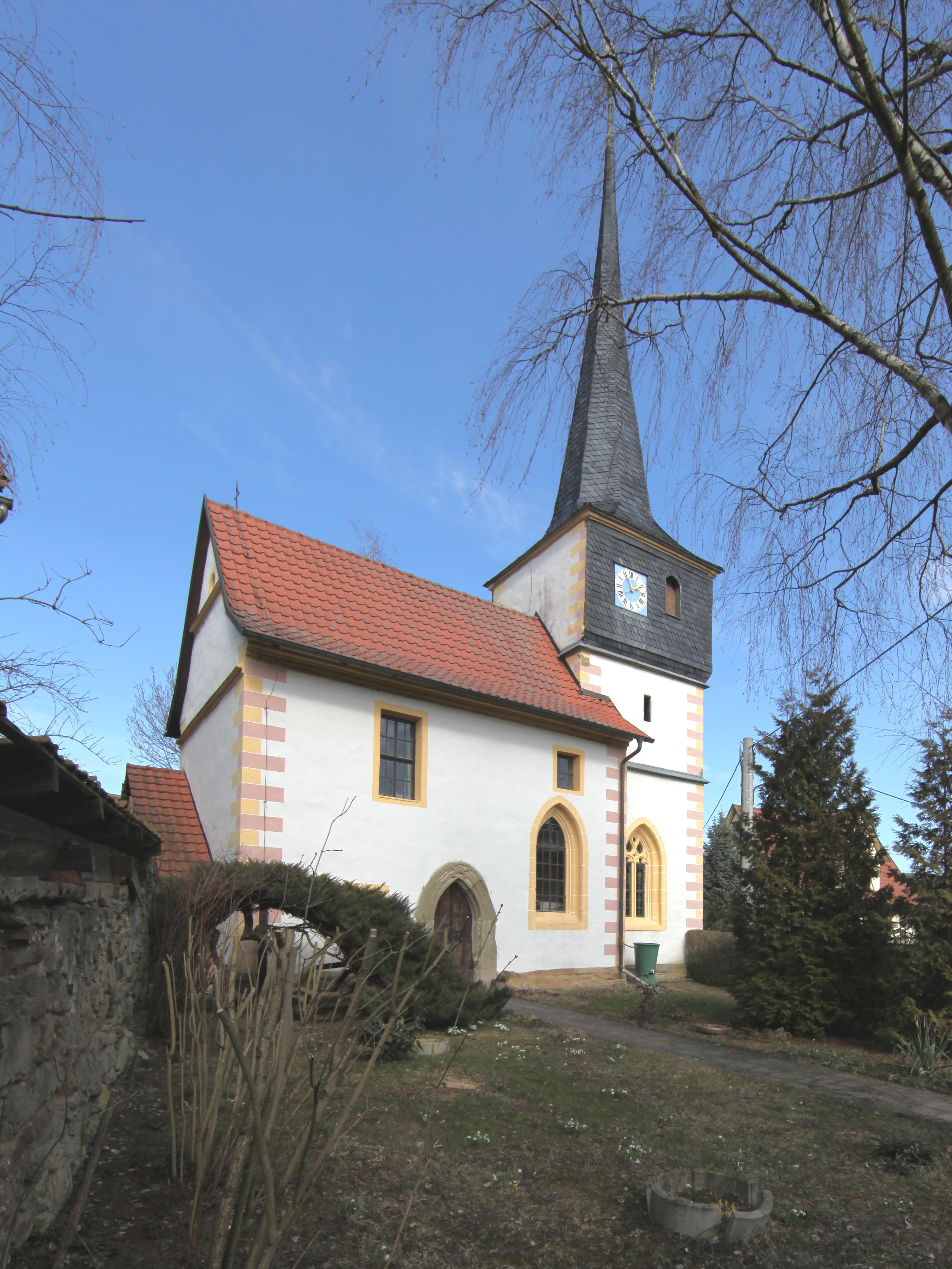 Evangelisch-Lutherische Kirche in Hindfeld bei Milz, OT von Römhild, Landkreis Hildburghausen